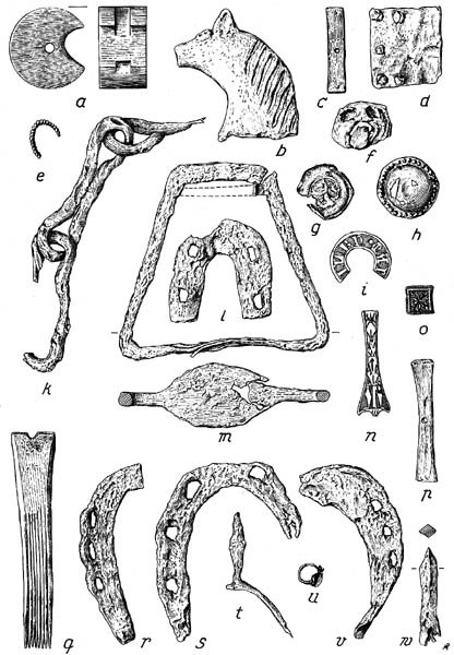 Beschreibung: Burg Camburg, Funde aus den Ausgrabungen 1935 Quelle: Gotthard Neumann: Burg Camburg an der Saale historisch und archäologisch. In: Karl-Heinz Otto / Joachim Herrmann (Hrsg.): Siedlung, Burg und Stadt. Studien zu ihren Anfängen. Deutsche Akademie der Wissenschaften zu Berlin. Schriften der Sektion für Vor- und Frühgeschichte 25, Berlin 1969, S. 404-418, hier S. 413 Abb. 5. Lizenzstatus: GNU-FDL . Die Funde sind im Besitz des Bereichs für Ur- und Frühgeschichte der Friedrich-Schiller-Universität Jena. Die Wiederveröffentlichung der Abbildungen wurde mir erlaubt. 17:13, 22. Okt 2004 Krtek76 416 x 600 (85.602 Byte) (Burg Camburg, Funde aus den Ausgrabungen 1935)